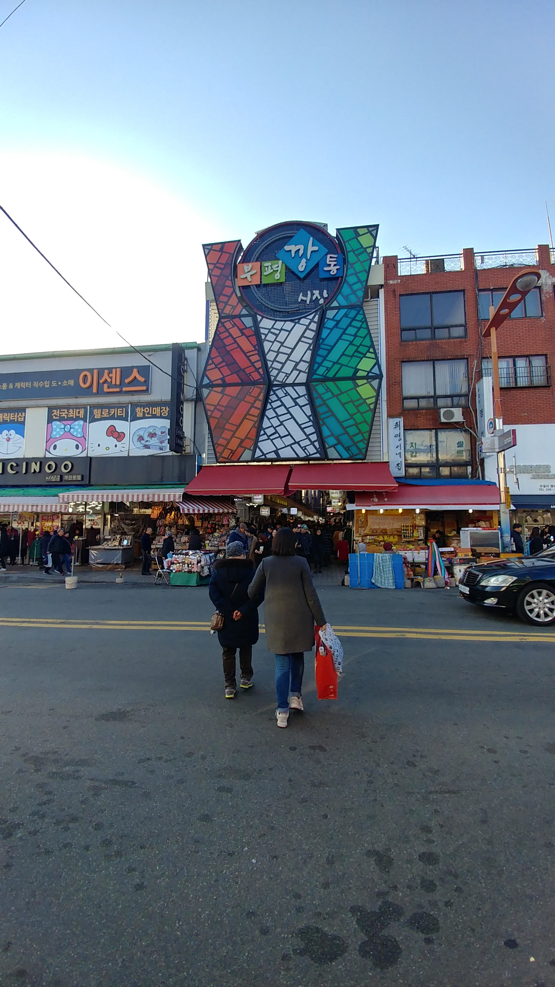 부평깡통시장 입구